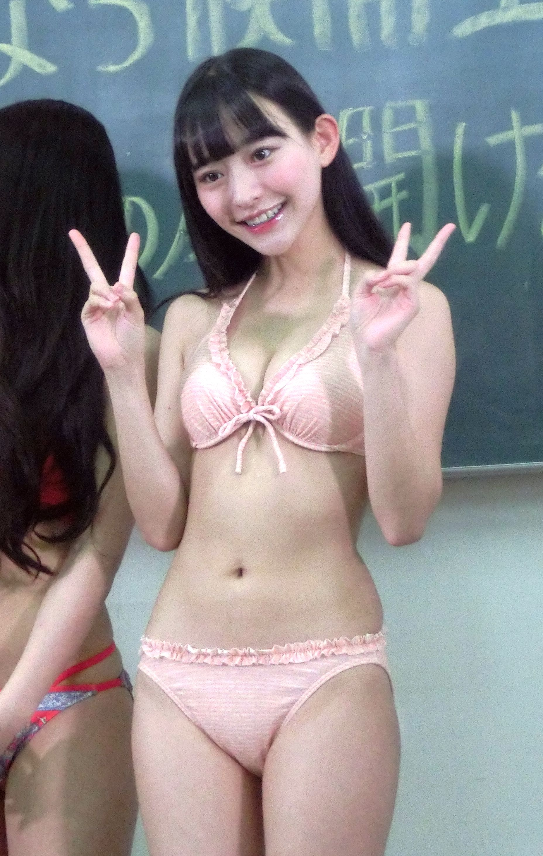 Miss genic 2019